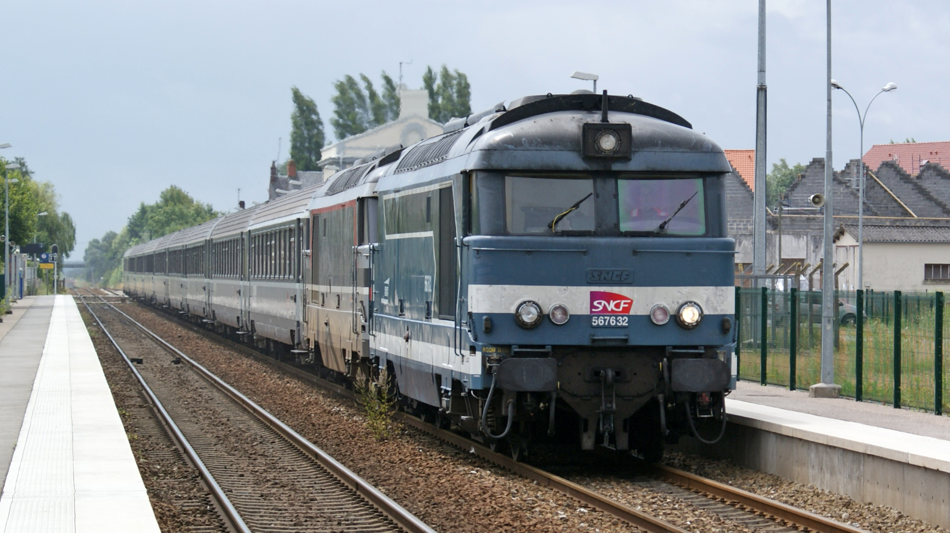 La BB 67632 est la dernière locomotive diesel livré à la SNCF au 20ème siècle, elle est d'ailleurs, la dernière locomotive diesel pour le service voyageursPhoto prise en gare de Rue